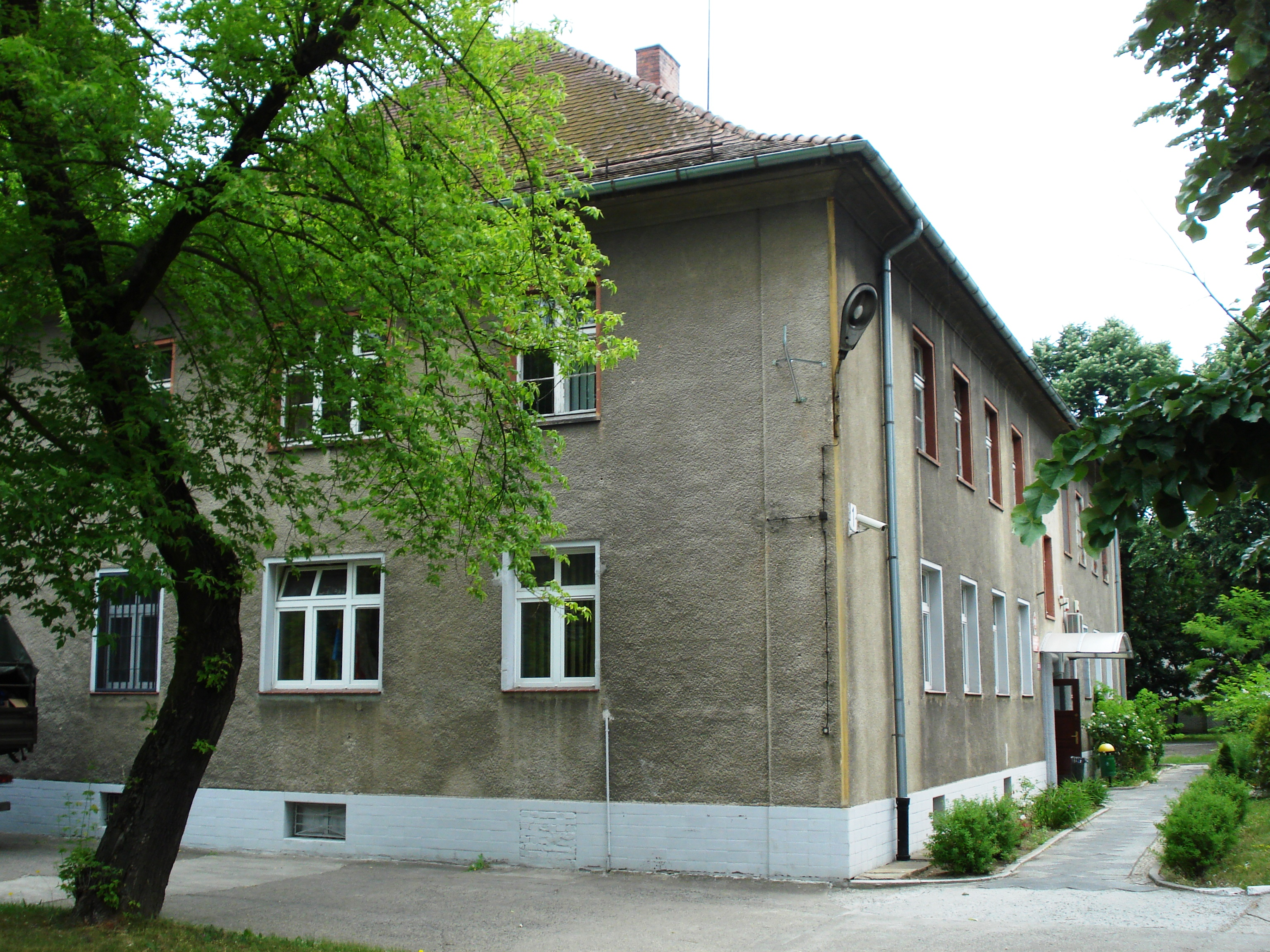 Siedziba Placówki Żandarmerii Wojskowej w Opolu